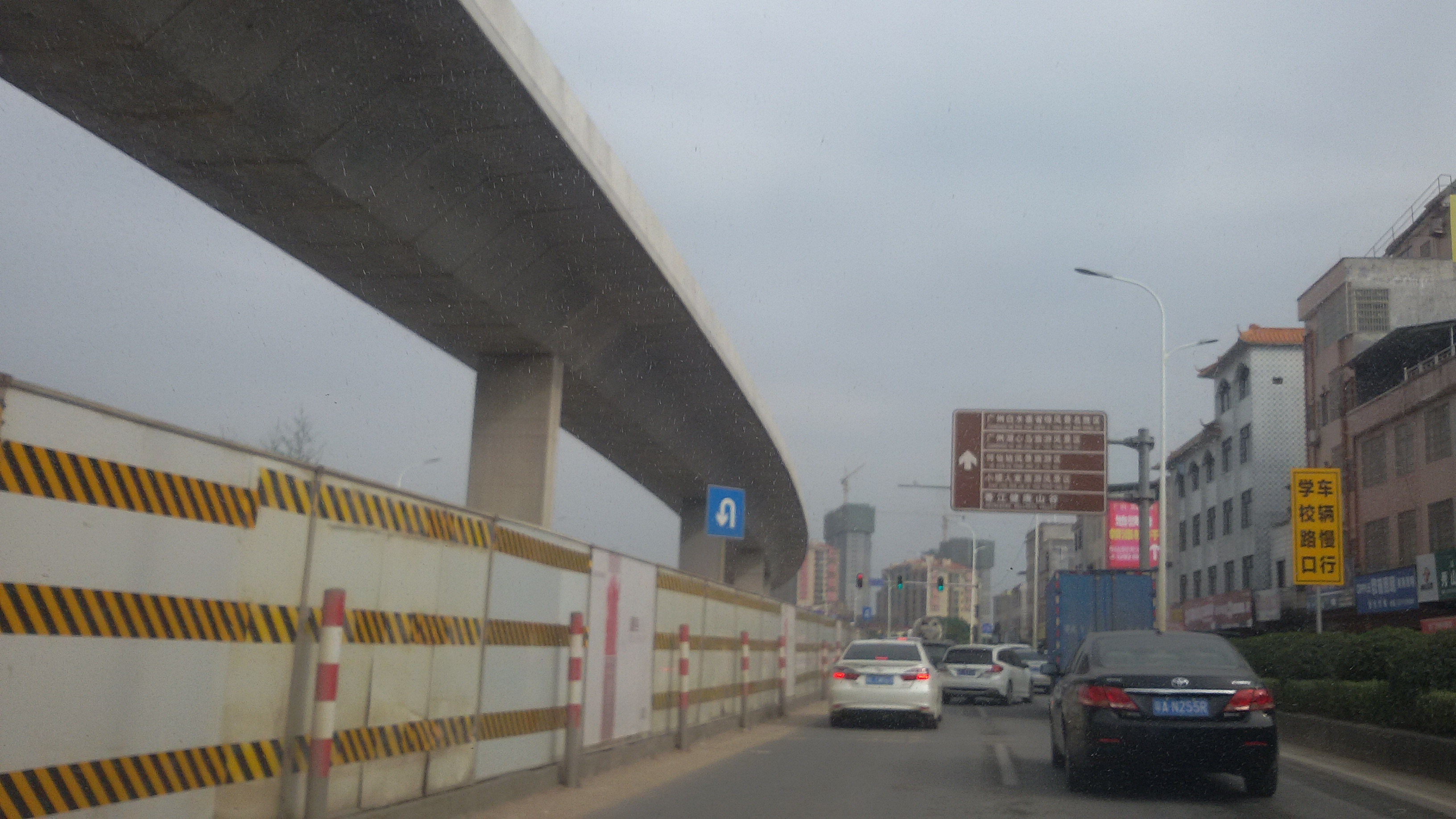 粵語: 2018年1月1號，喺增城朱村附近嘅廣州地鐵21號綫高架重喺度圍蔽緊。